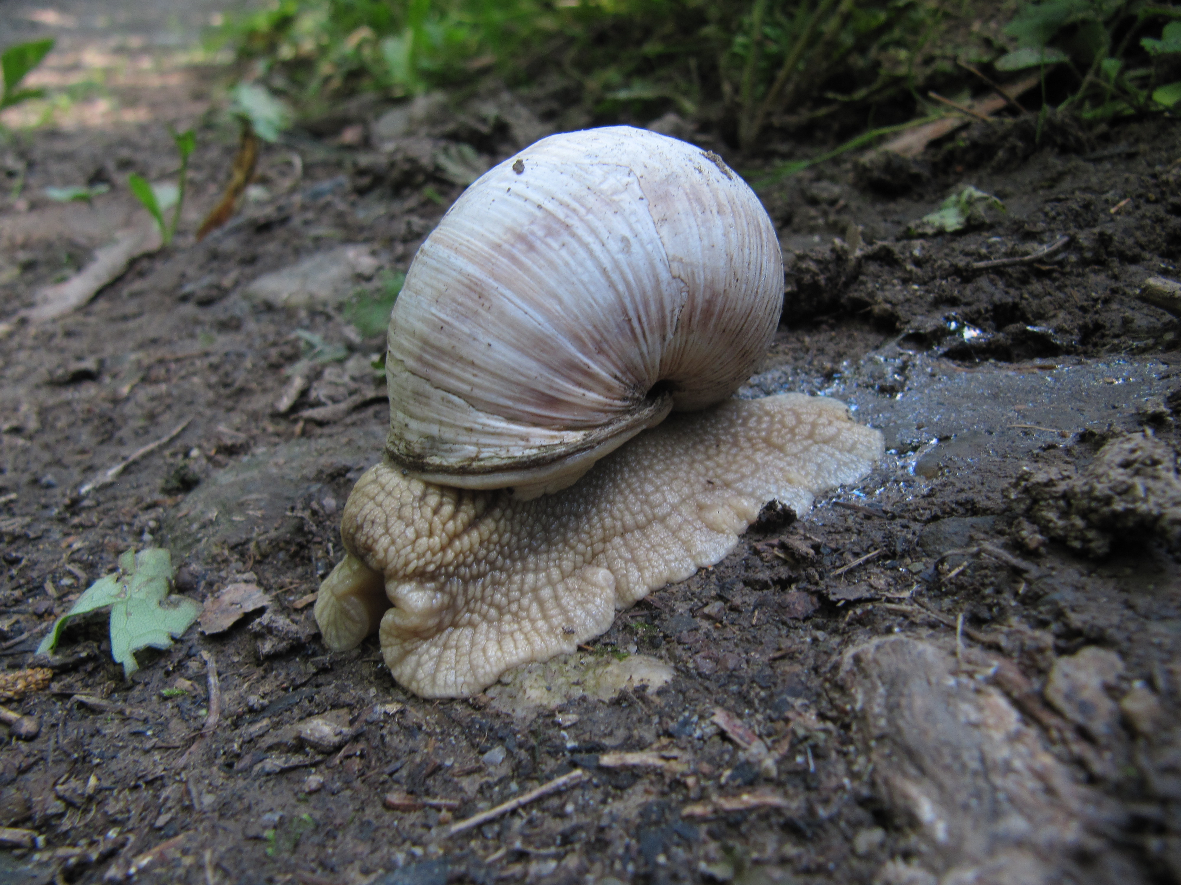 Rusava, okres Kroměříž, Česká republika. Hlemýžď zahradní.